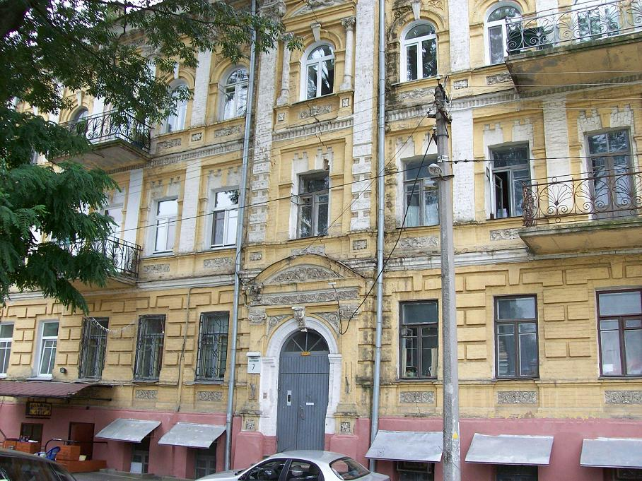 MachtetsHome.jpg: Будинок № 7 у Десятинному провулку в Києві, де мешкав Григорій Мачтет